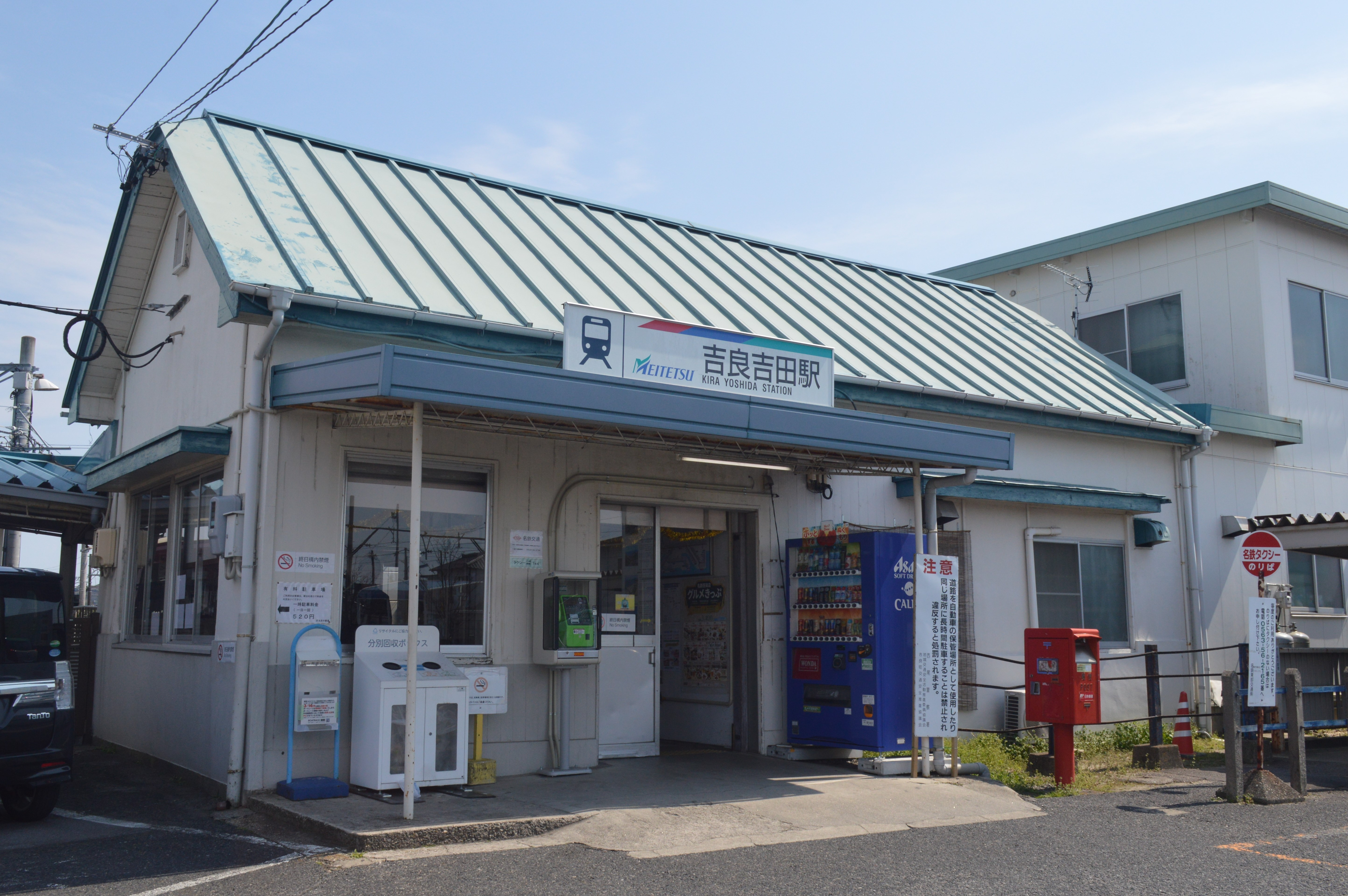 愛知県西尾市にある名鉄西尾線・蒲郡線吉良吉田駅。